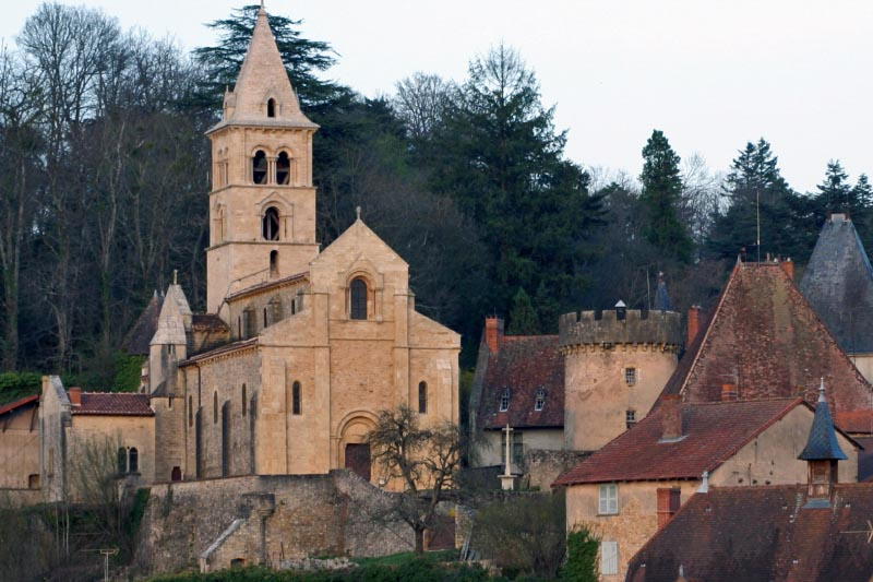 Vue générale de l'église de Châteauneuf prise de l'ouest